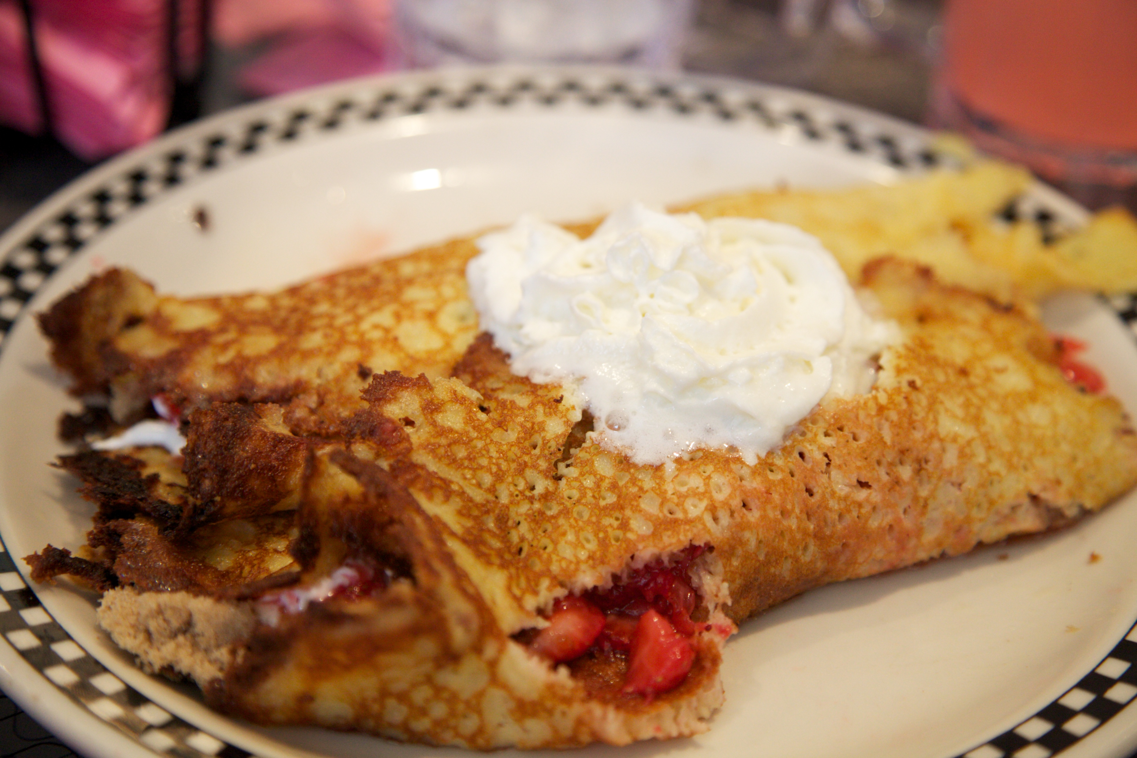 Pancake at Pamela's Diner